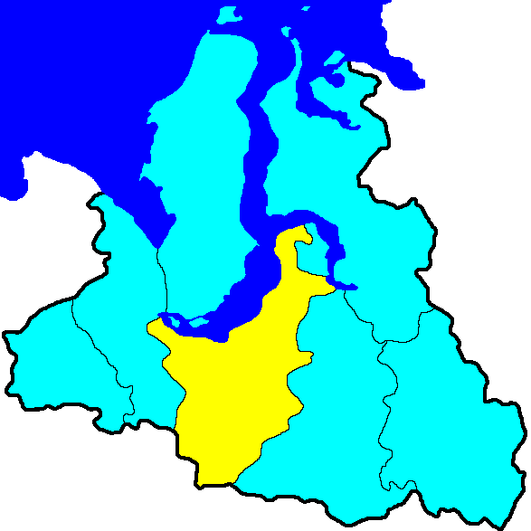 Надымский район на карте Ямало-Ненецкого АО